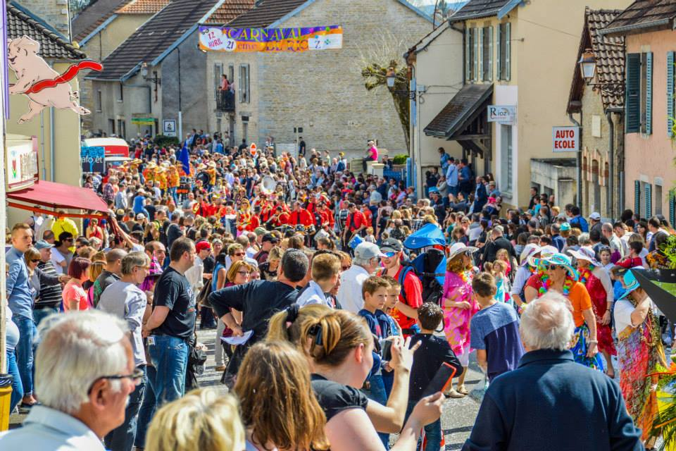 Le carnaval de Rioz (Haute-Saône)